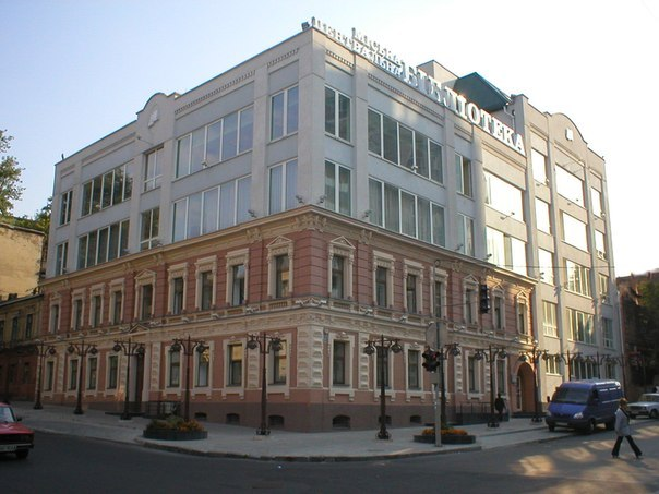 Фото Дніпровської Центральної міської бібліотеки